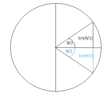 Mostra la relació entre la funció corda d'un angle i la funció sinus de l'angle meitat